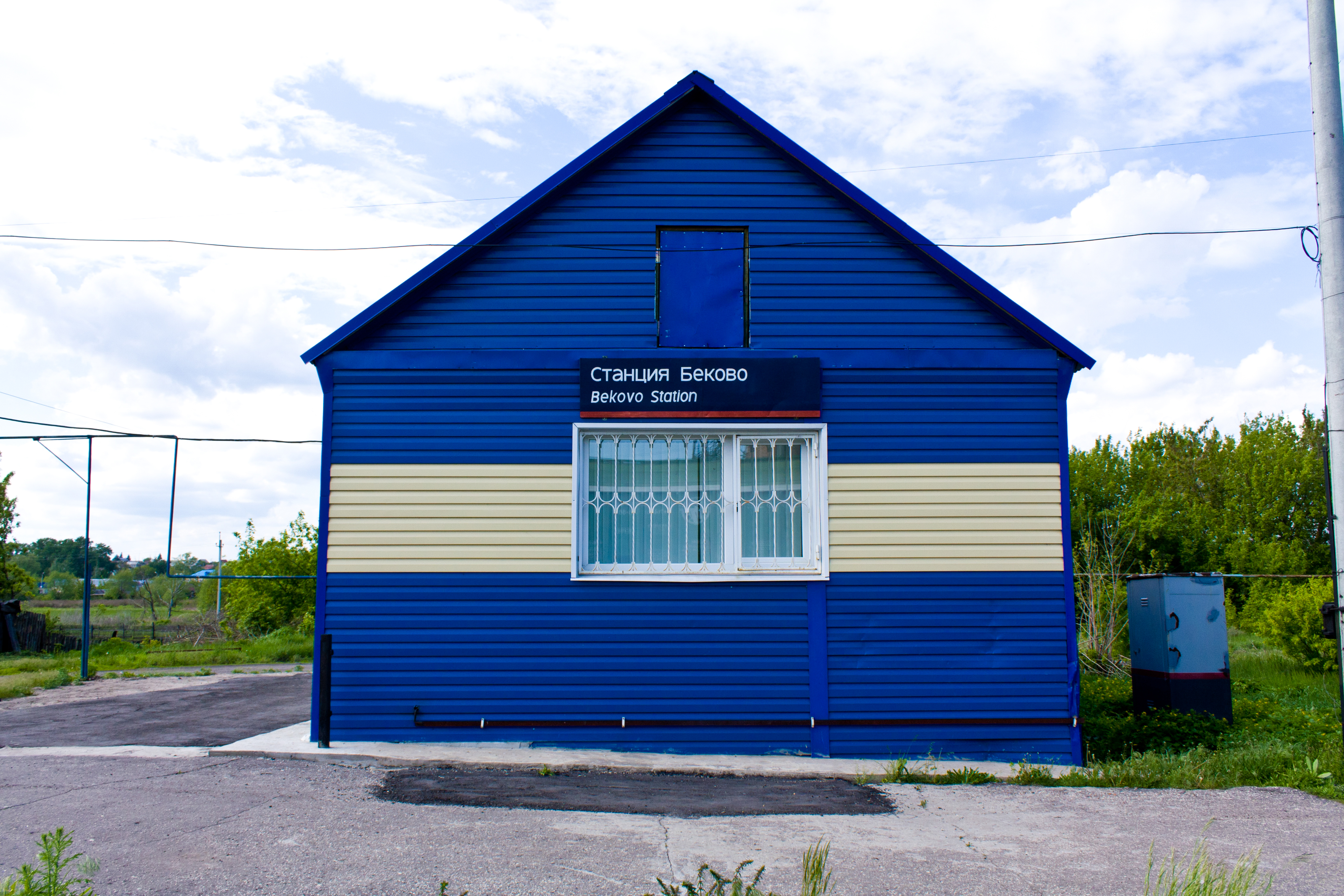 Железнодорожный вокзал станции Беково. 2020 год.